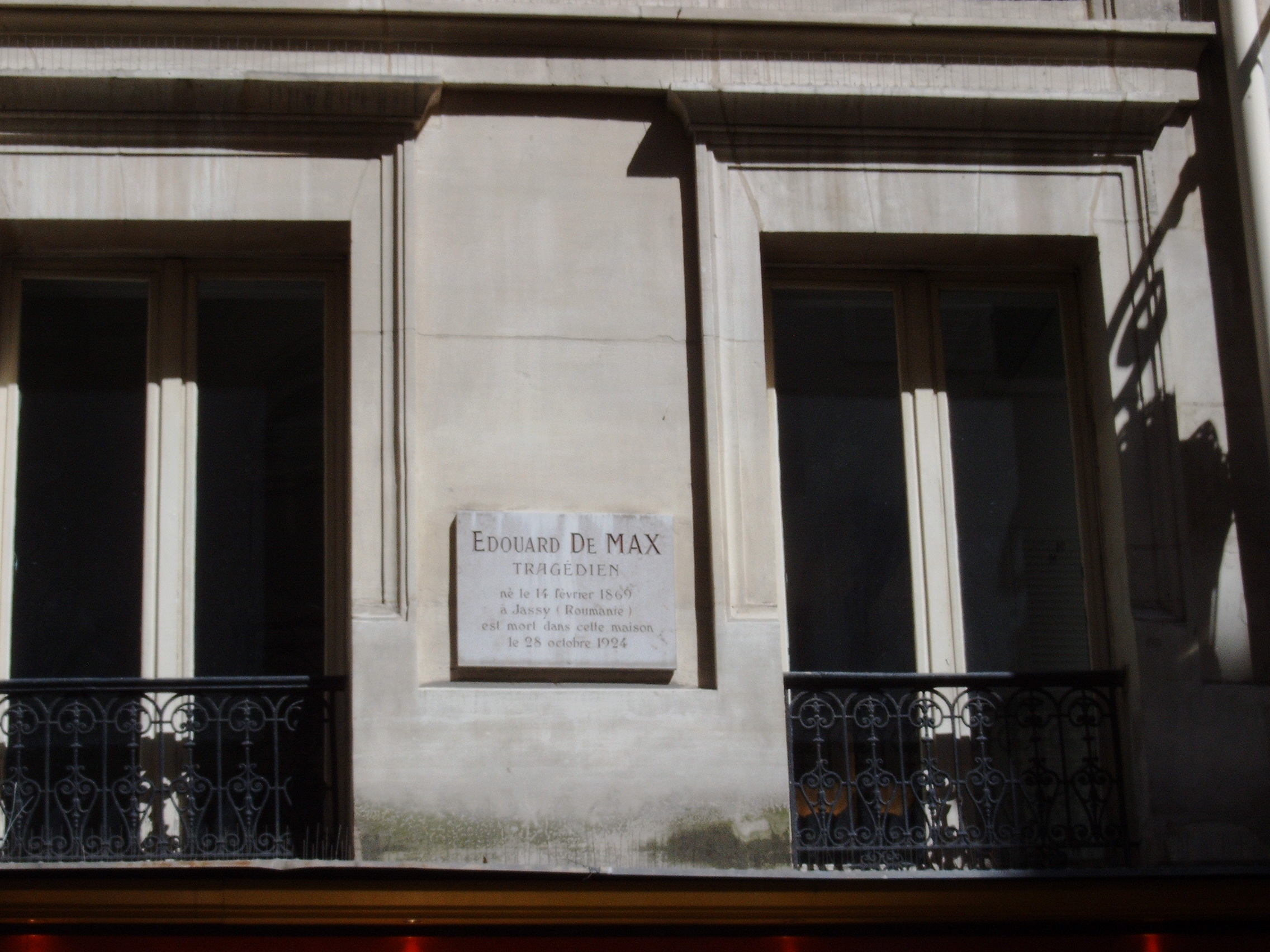 Plaque commémorative à Édouard De Max au 66 rue de Caumartin